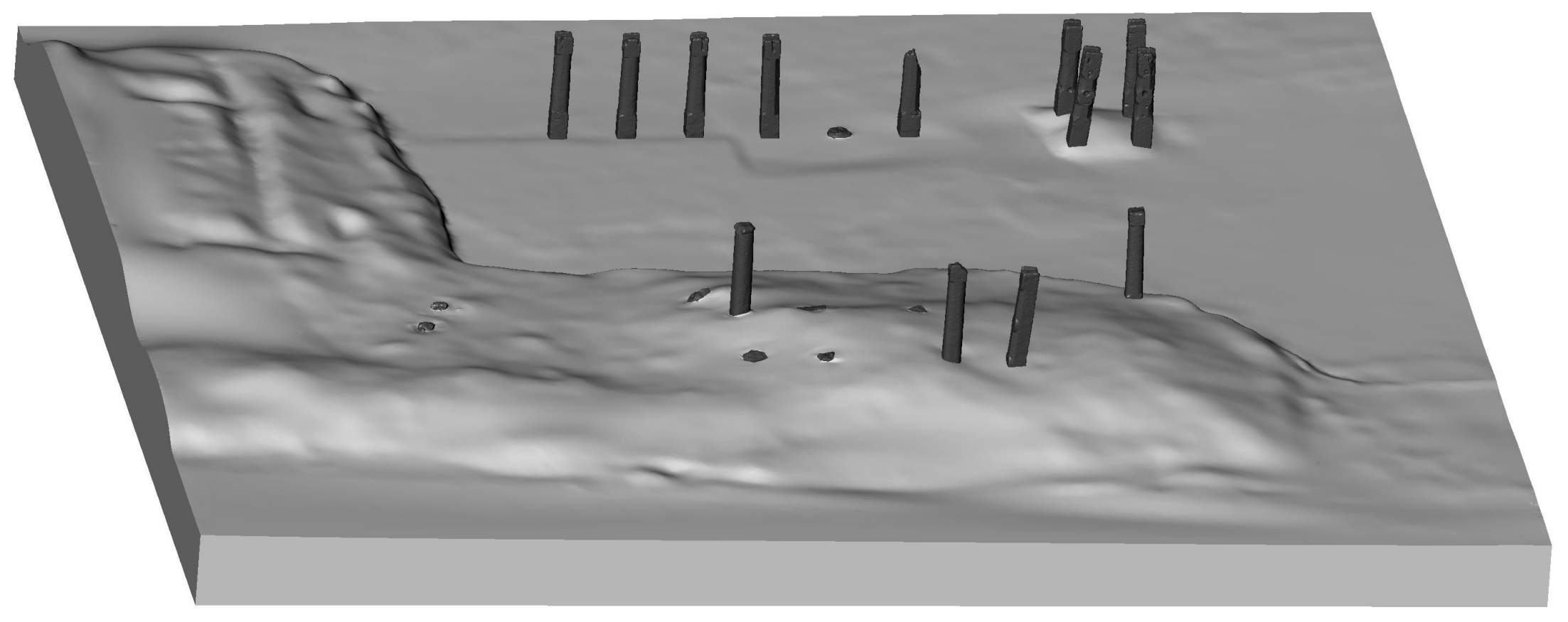 ଓଡ଼ିଆ: ଶିଶୁପାଳଗଡ଼, ପୁରୁଣା ଭୁବନେଶ୍ଵରର ଅନତିଦୂରରେ ଦୟାନଦୀ ନିକଟରେ ଏହି ପୁରୁଣା ନଗରର ଭଗ୍ନାବଶେଷ ଏଠାରେ ଦେଖିବାକୁ ମିଳିଥାଏ ।